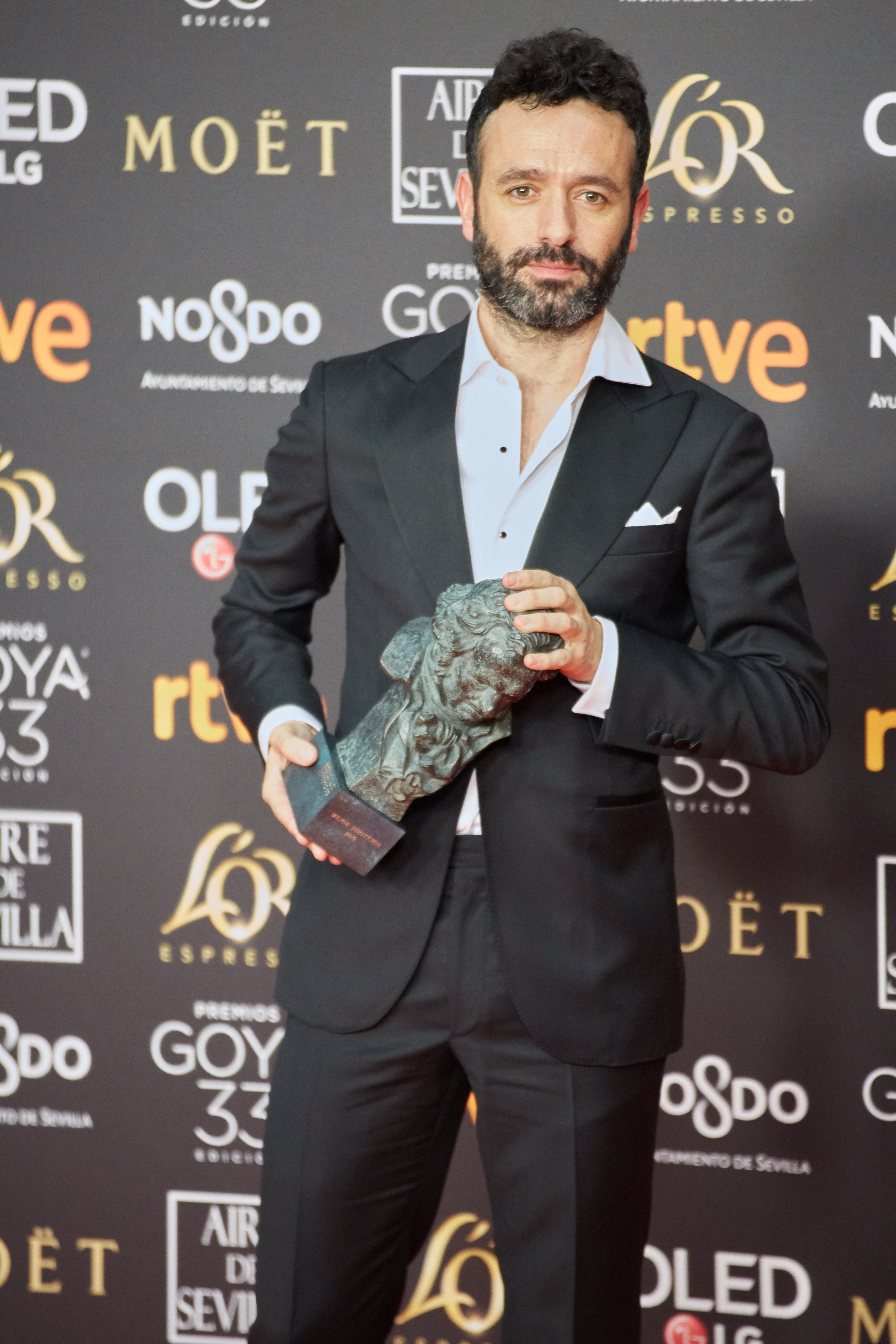 Rodrigo Sorogoyen exhibiendo su Goya 2019 a la Mejor Dirección por El reino